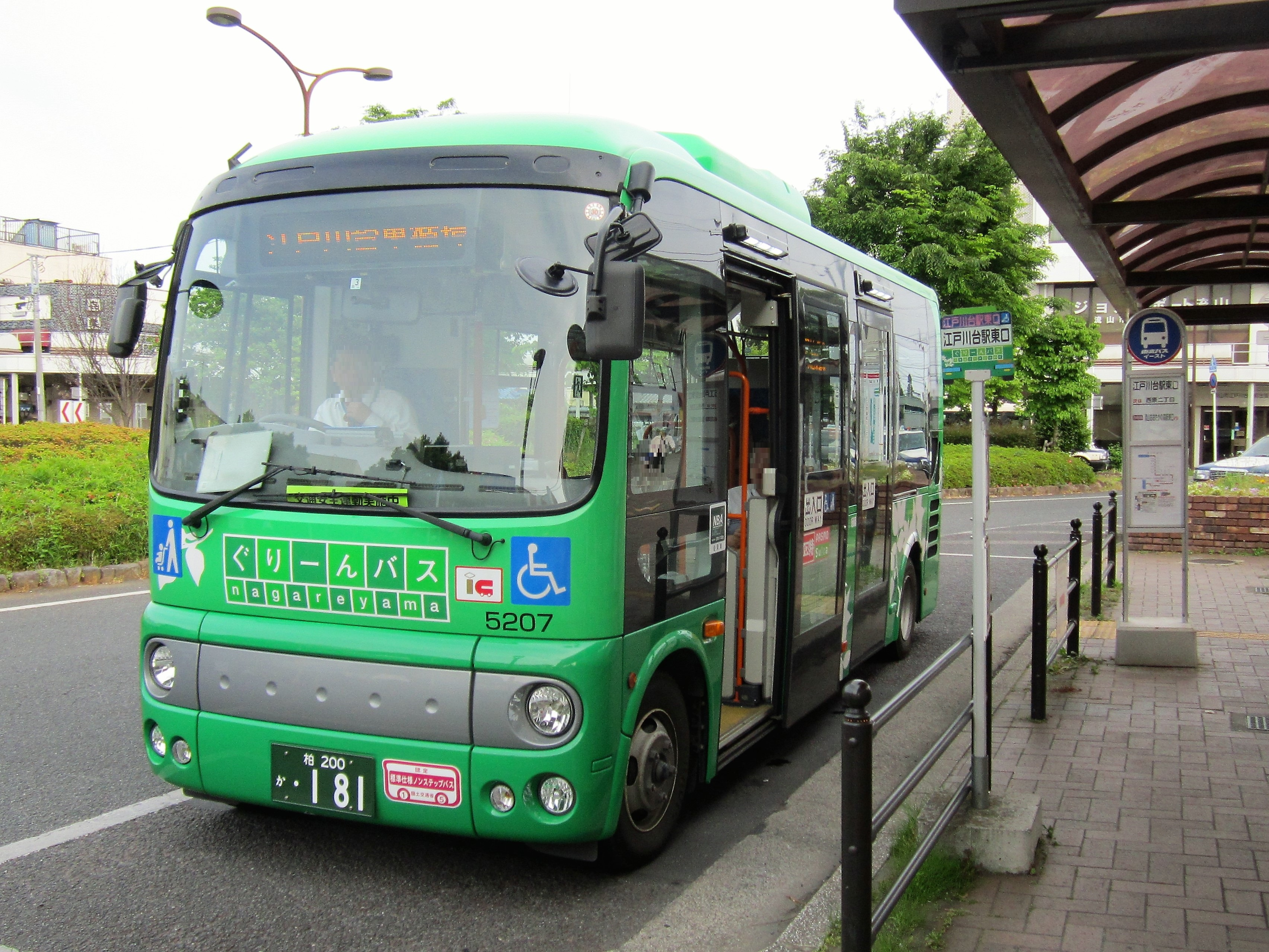 流山ぐりーんバス 江戸川台東ルート（江戸川台駅東口） Canon PowerShot A2200